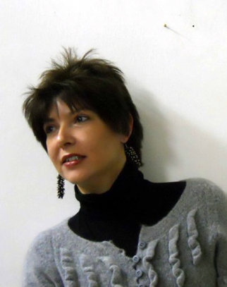 Portrait der venezianischen Malerin Claudia Zuriato